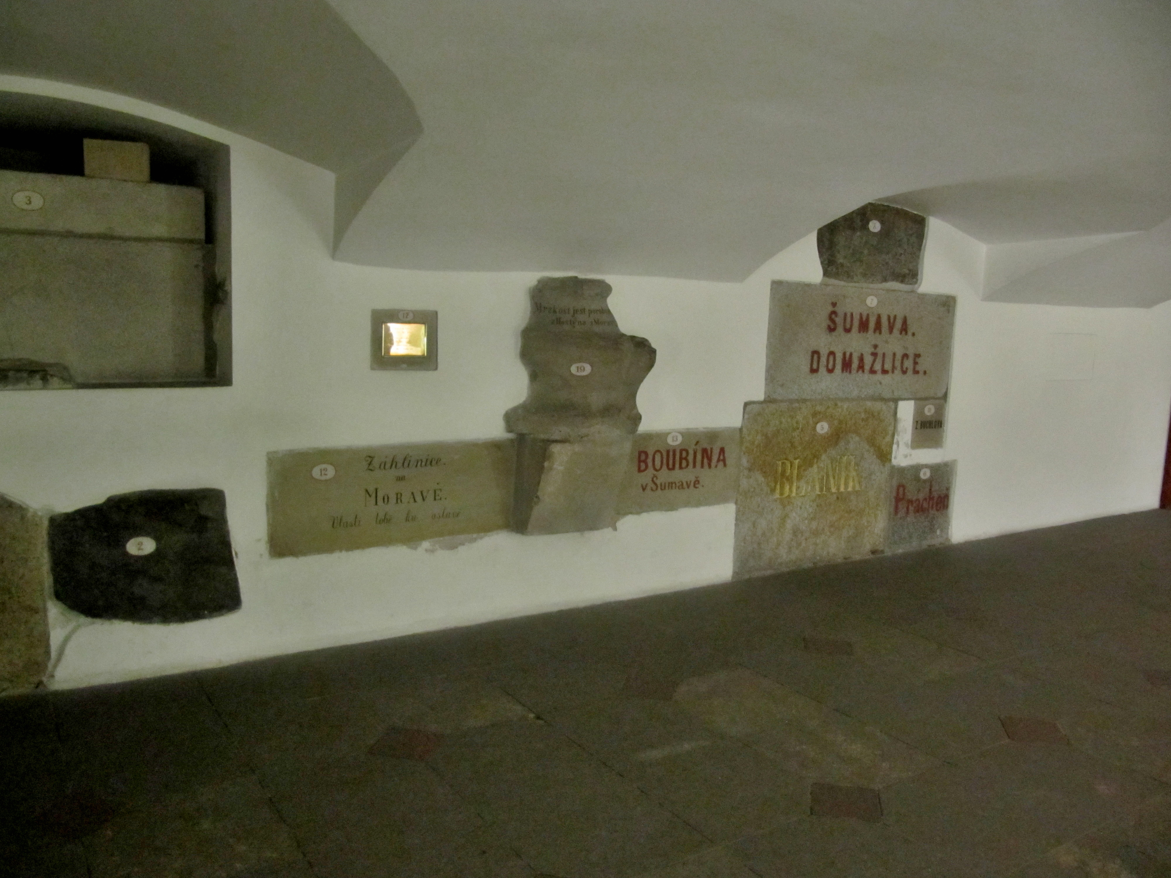 Národní divadlo (Nové Město), Praha 1-Nové Město, Národní 223/2, Masarykovo nábřeží 223/40 a 42, Divadelní 223/1